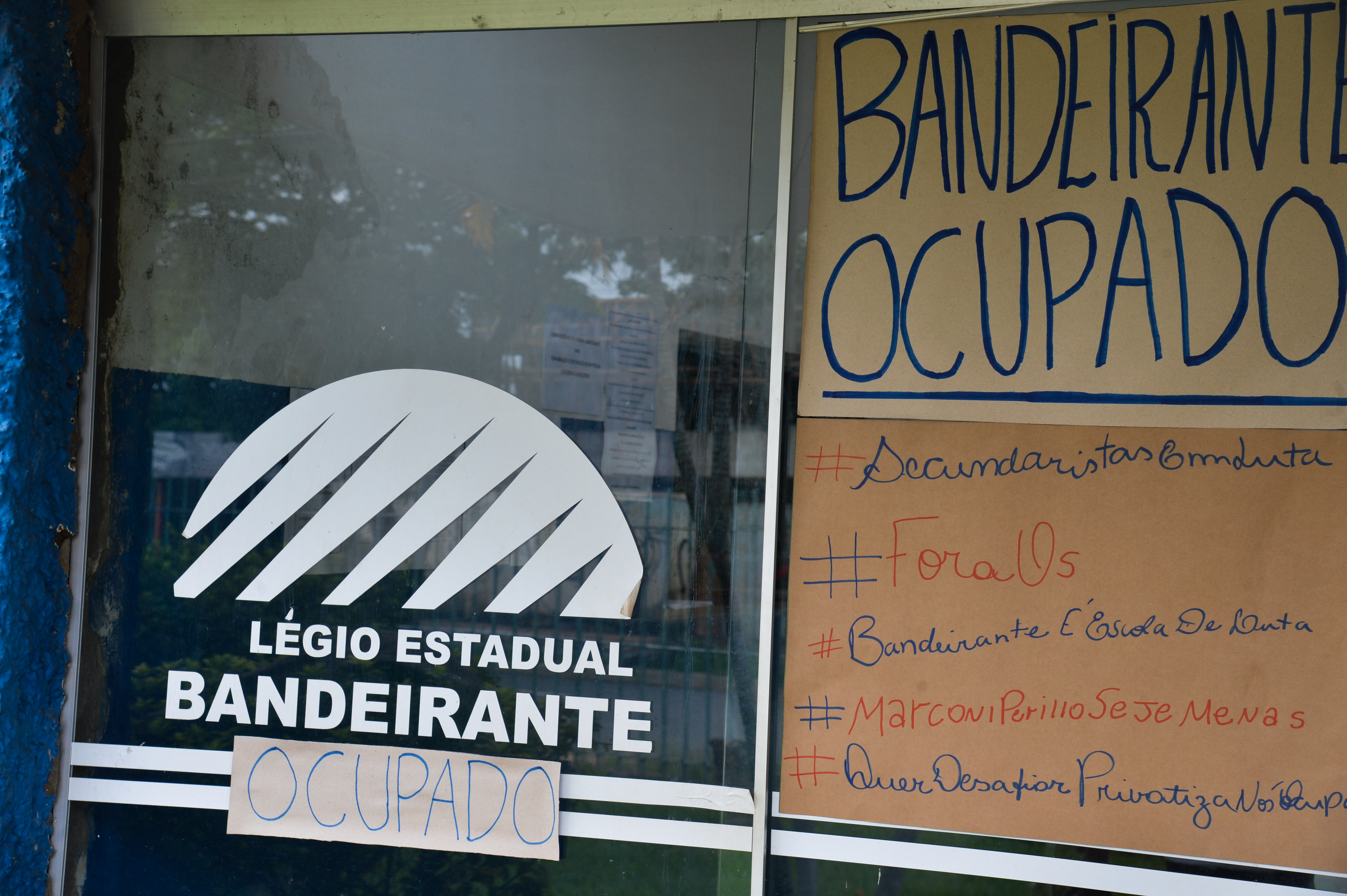 Goiânia/GO - O Colégio Estadual Bandeirante foi um dos ocupado por alunos (Valter Campanato/Agência Brasil)